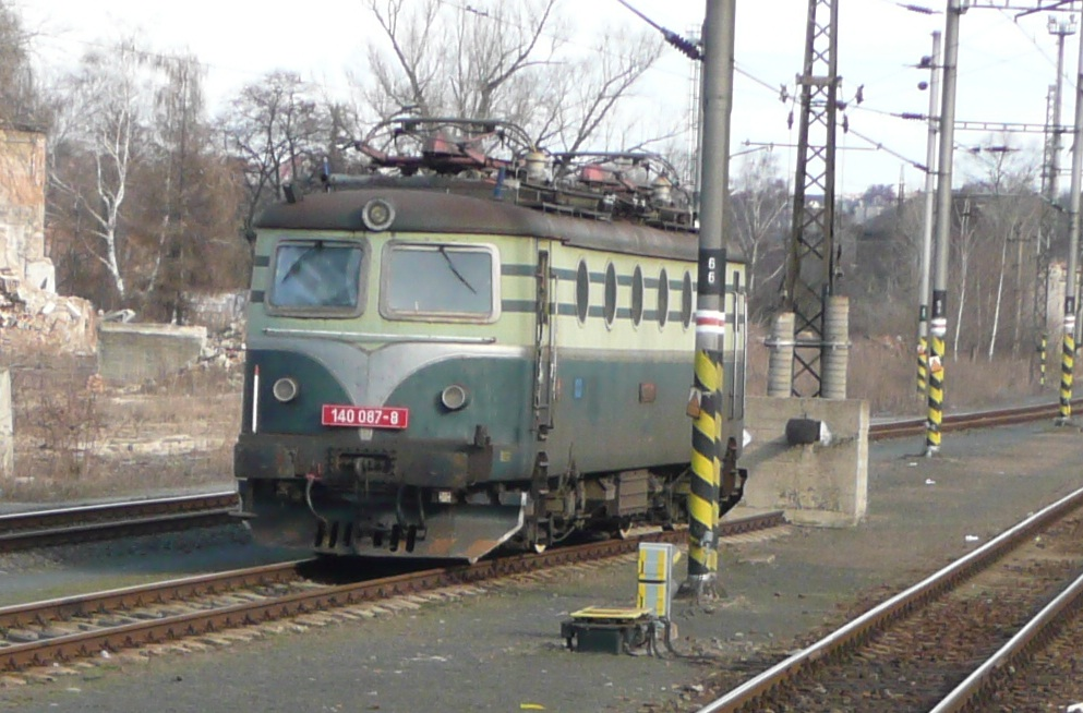 140.087 abgestellt im Bahnhof Kralupy nad Vltavou